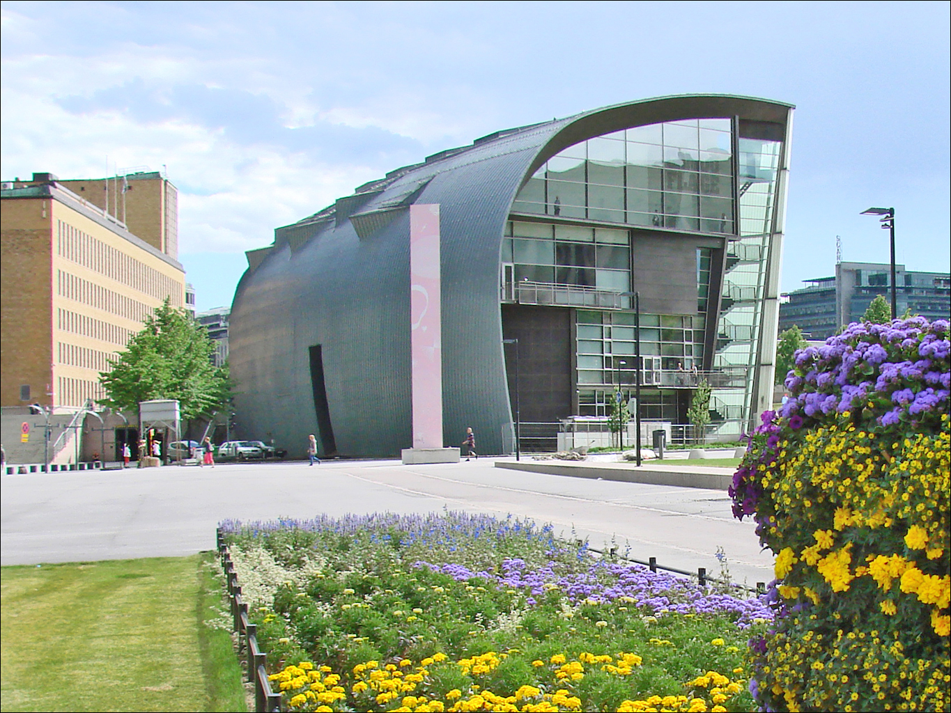 Vue de l'arrière du Kiasma depuis l'espace vert créé autour du nouveau Palais de la musique Le Kiasma est le grand musée d'art contemporain d'Helsinki. La bâtiment a été conçu par l'architecte américain : Steven Holl qui a réussi son intégration en plein coeur de la ville. L'établissement a été inauguré en mai 1998 et organise de nombreuses expositions et manifestations artistiques. Le Kiasma possède des collections permanentes mais se définit comme un carrefour de toutes les formes d'expression artistique. Site du musée site de l'architecte